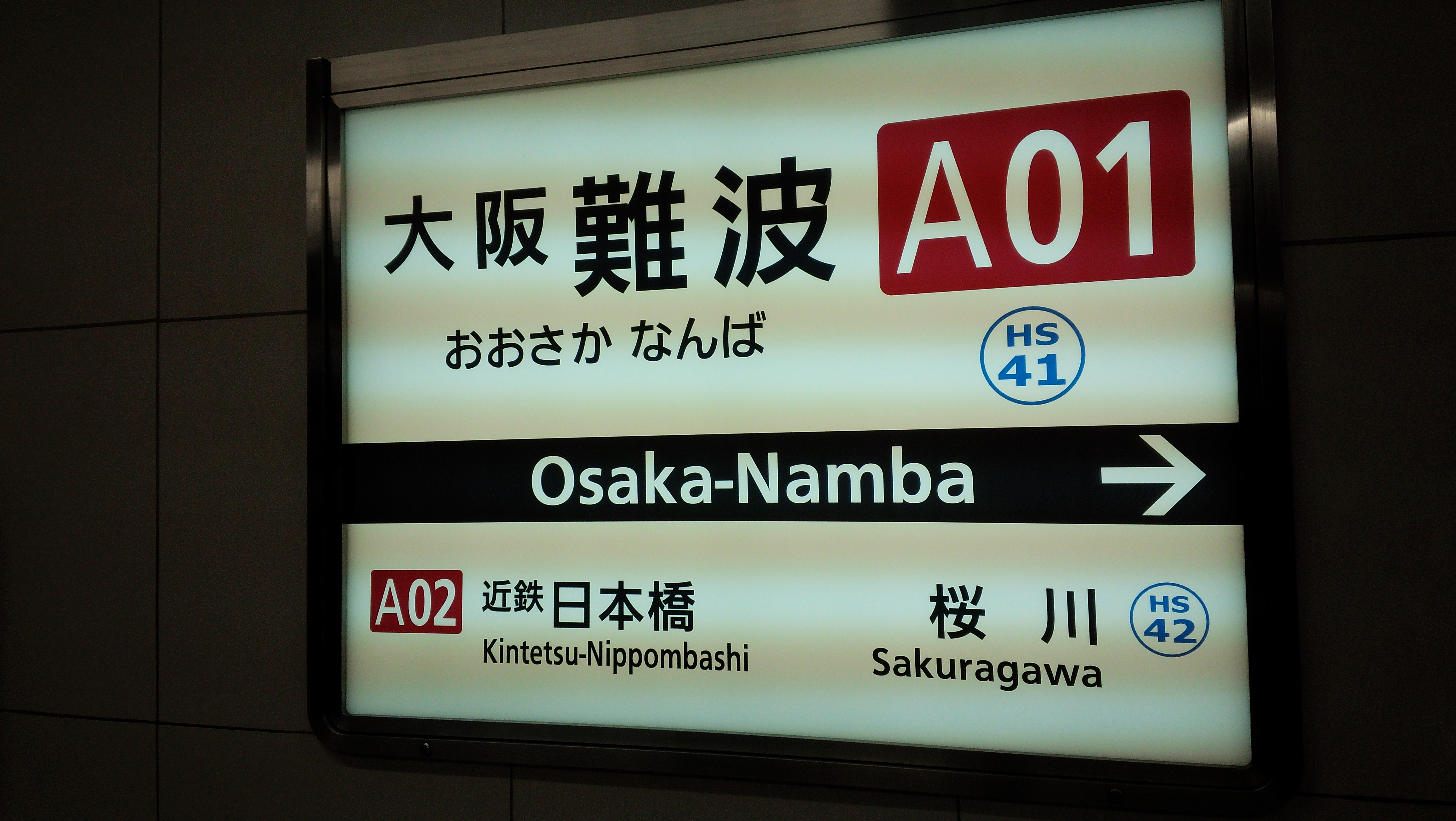 近鉄・阪神の駅ナンバリングの入った大阪難波駅の駅名標